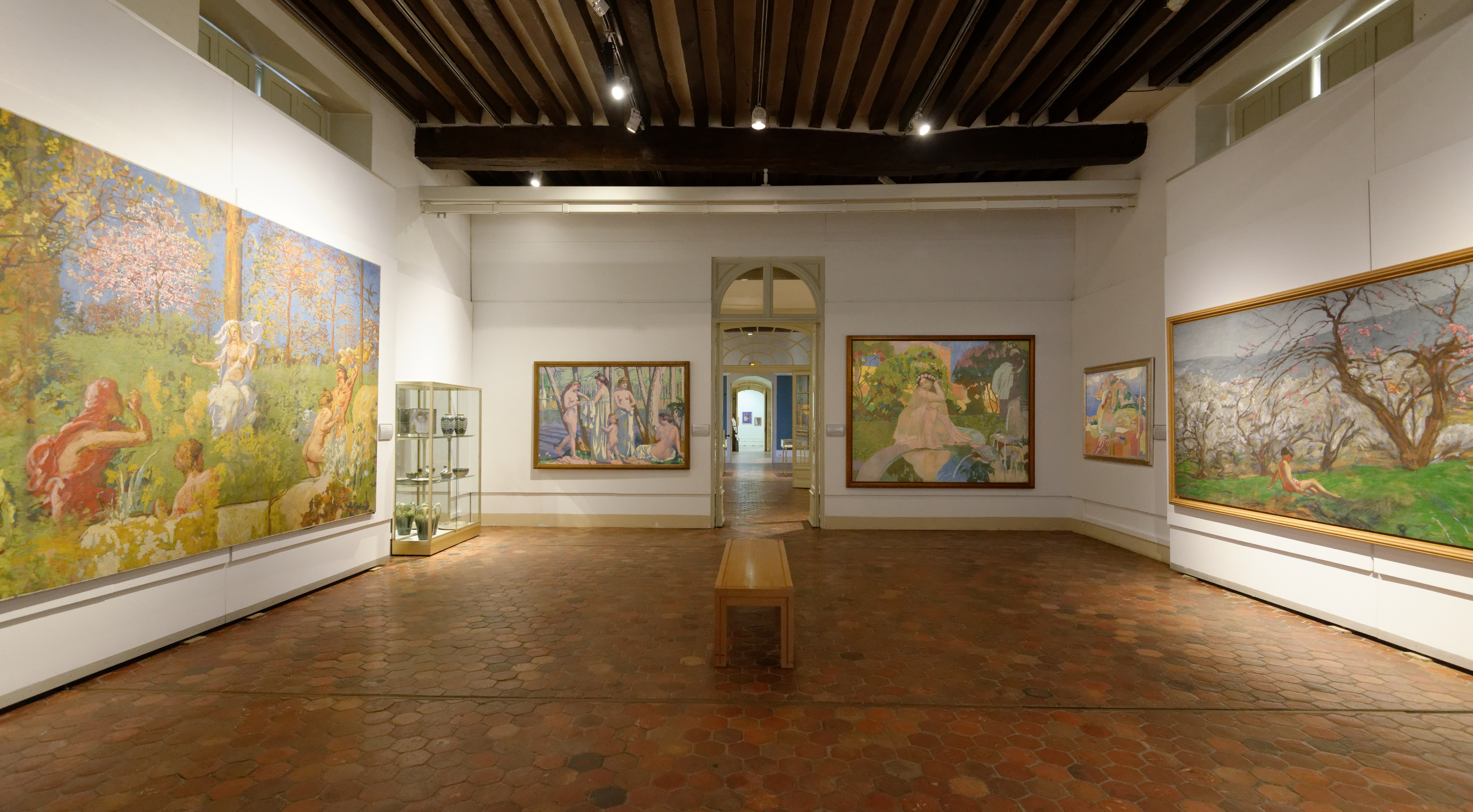 Salle au premier étage du Musée départemental Maurice Denis « Le Prieuré ».